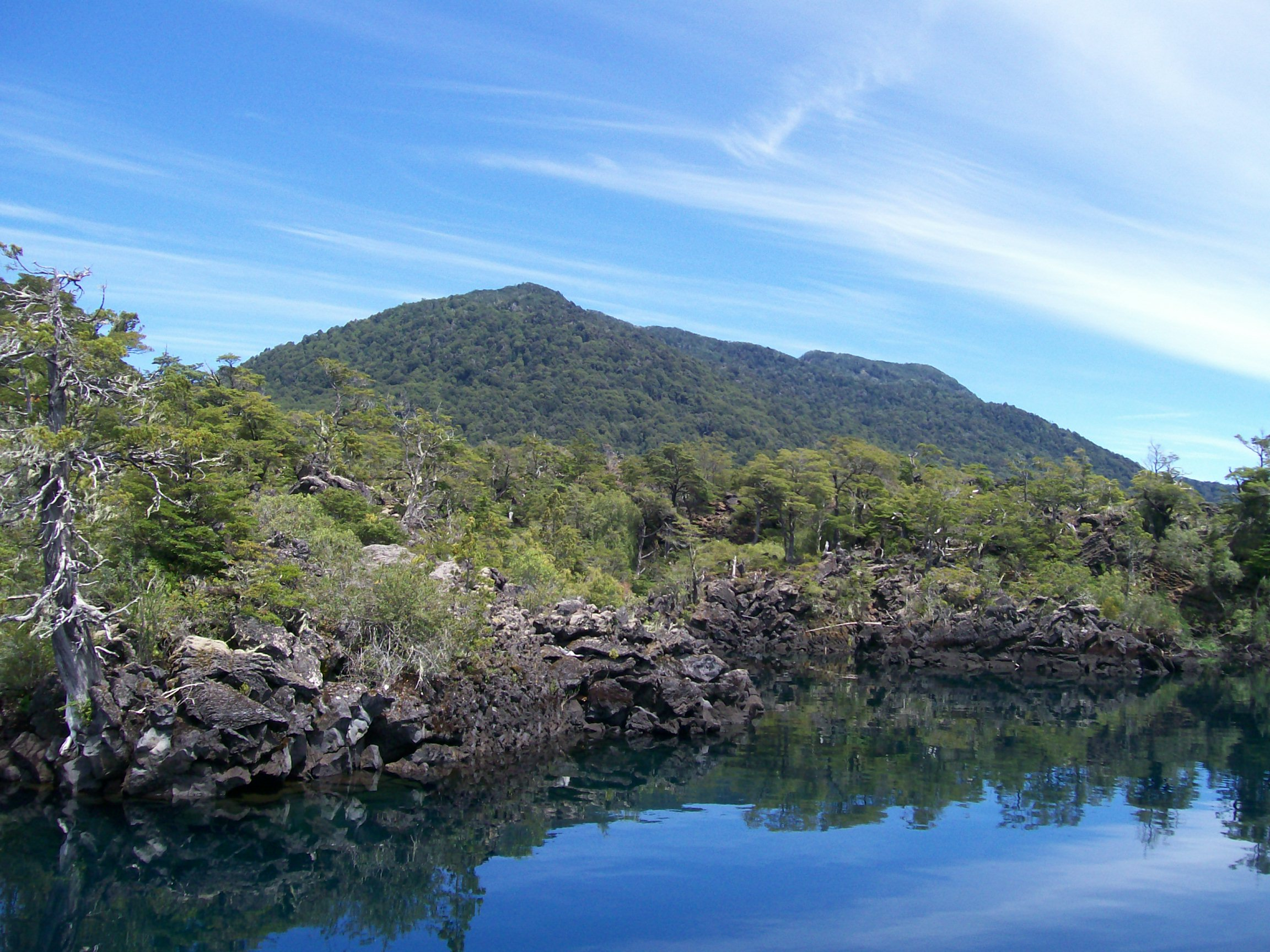 Escorial volcánico, lago Huechulafquen